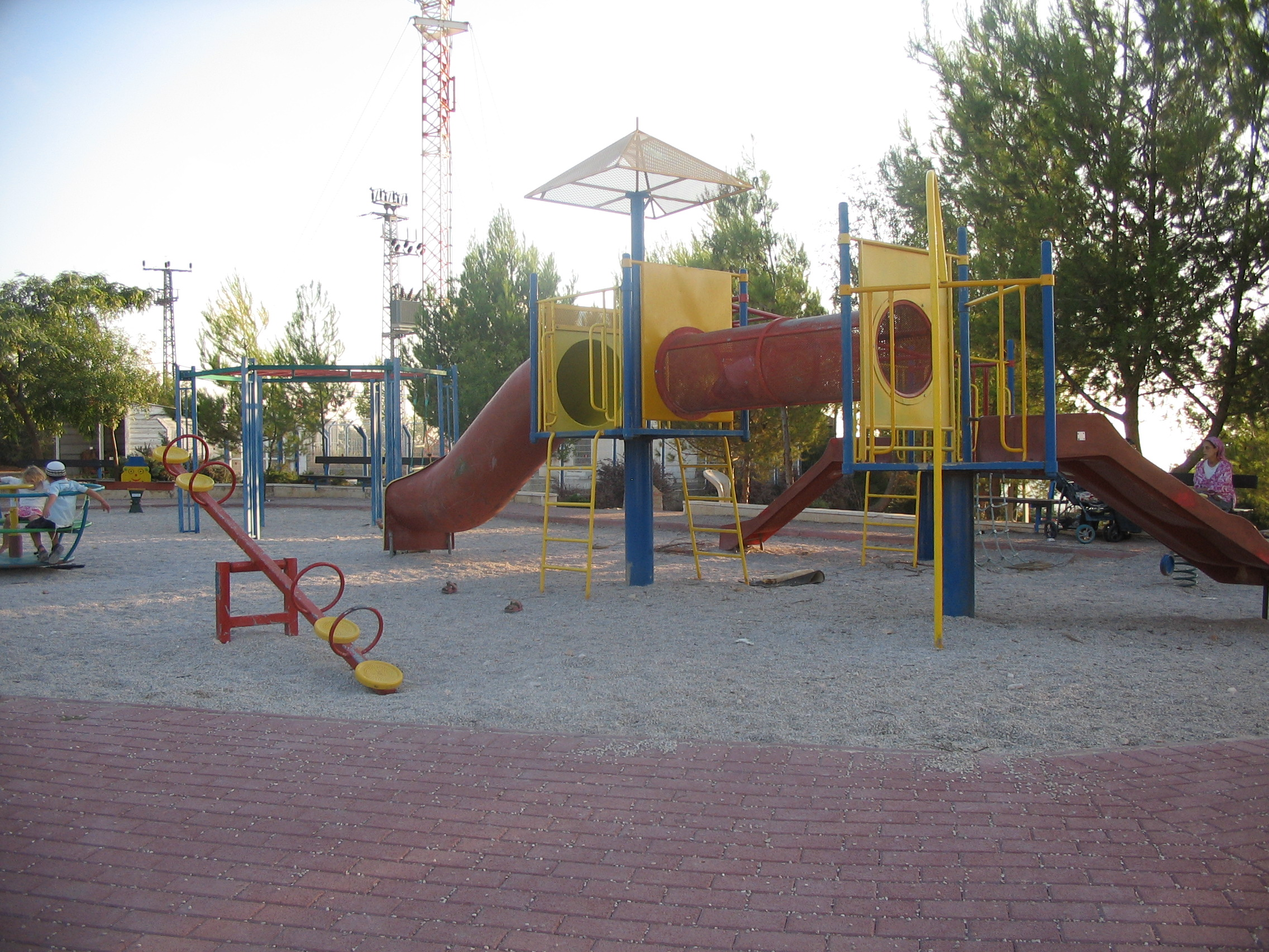 Детская площадка в Атерет возле центральной синагоги